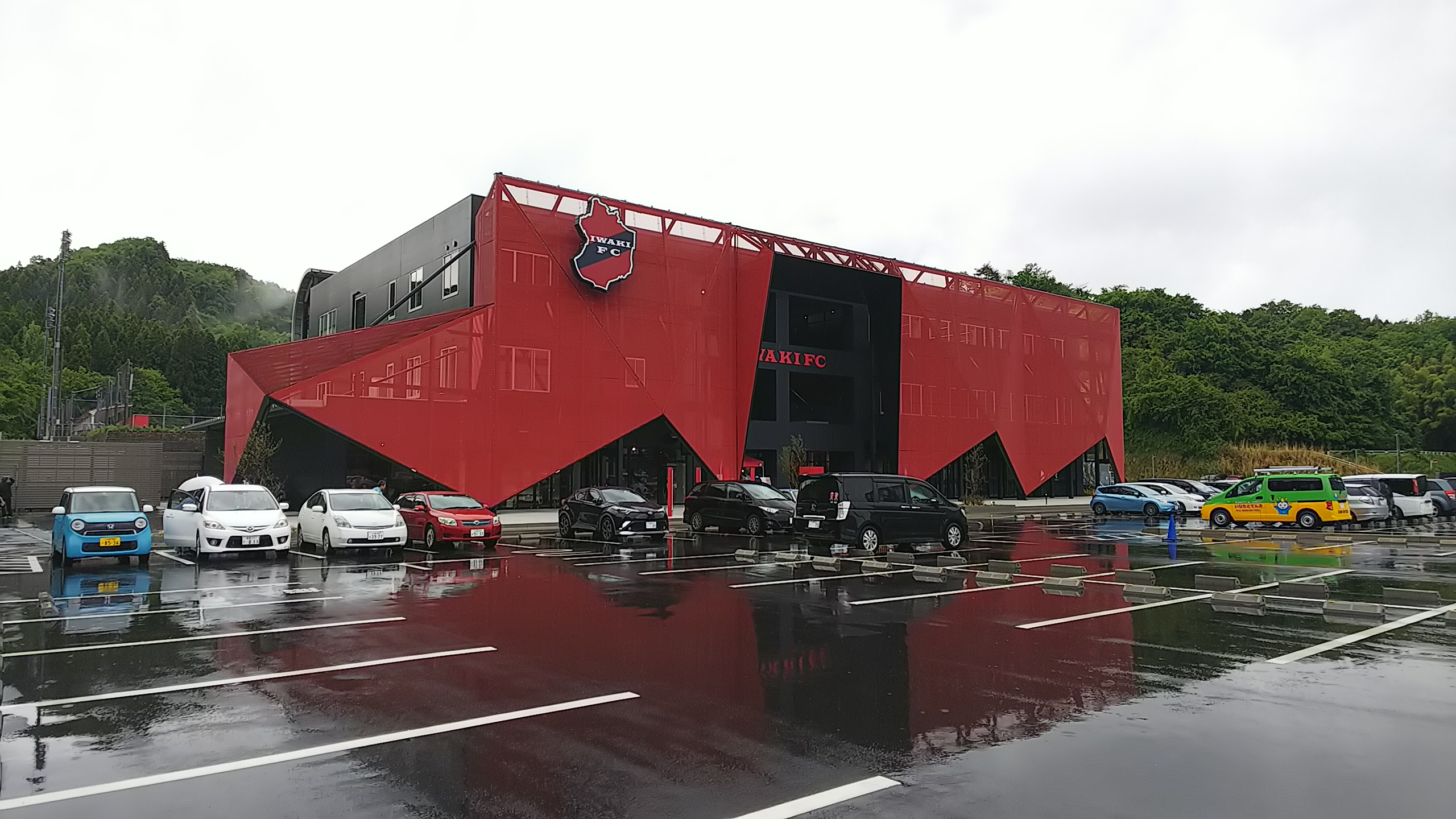 いわきFCクラブハウス。いわきFCパーク内にあるクラブハウス兼複合商業施設。